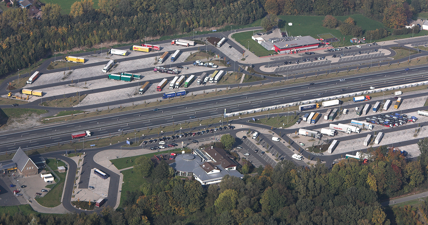 Luftbildaufnahme Hamm